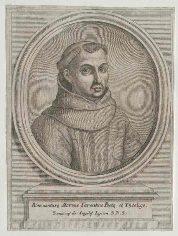 Teologo francescano e letterato nato a Taranto nel 1557 e morto nel 1621. Il suo nome al secolo è Cataldo.